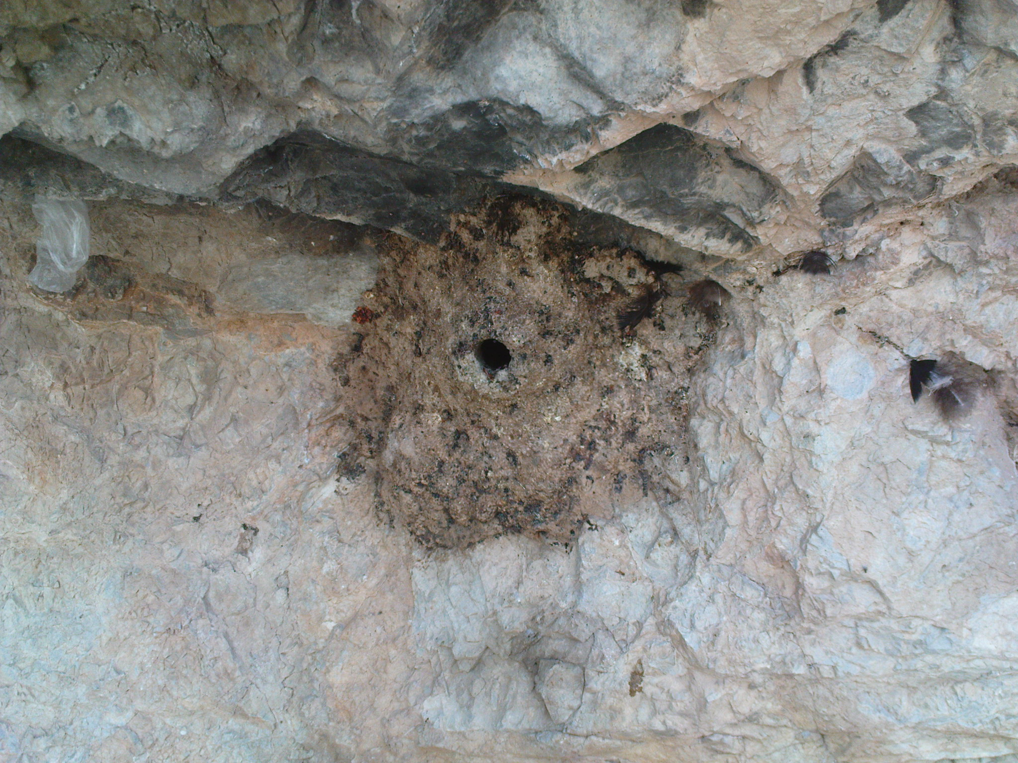 Merops apiaster nest